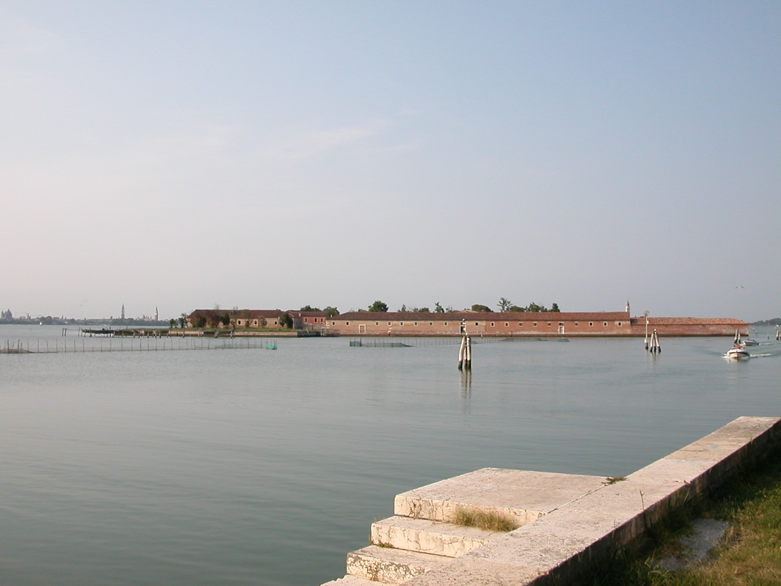 Venezia - Isola del Lazzaretto Vecchio